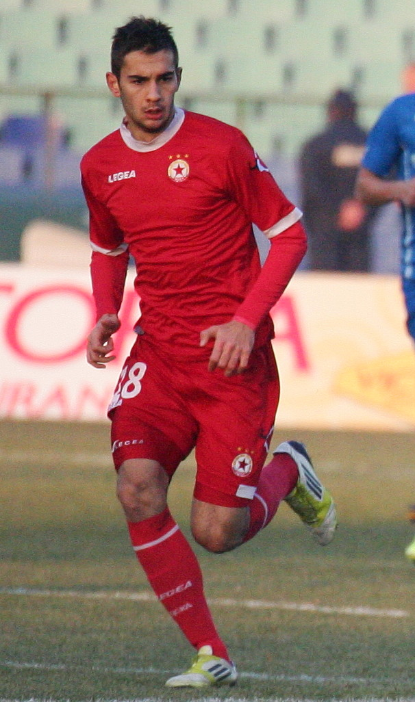 Ивайло Чочев - български футболист, който от зимата на 2012 г. играе в ЦСКА (София).